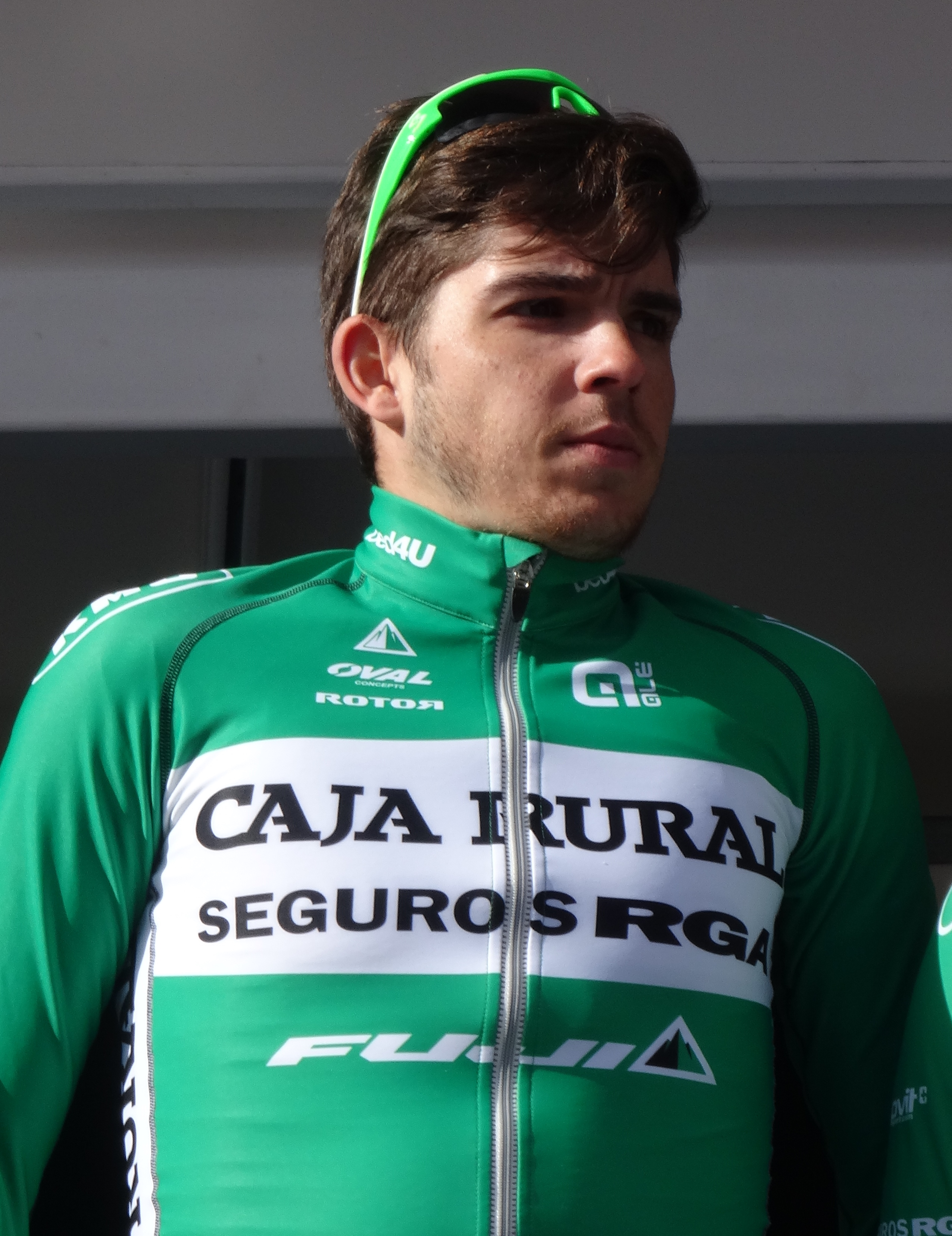 Reportage réalisé le mercredi 4 mars à l'occasion du départ du Samyn des Dames 2015 et du Samyn 2015 à Quaregnon, Belgique.